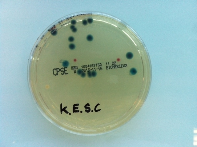 culture de KESC sur CPSE